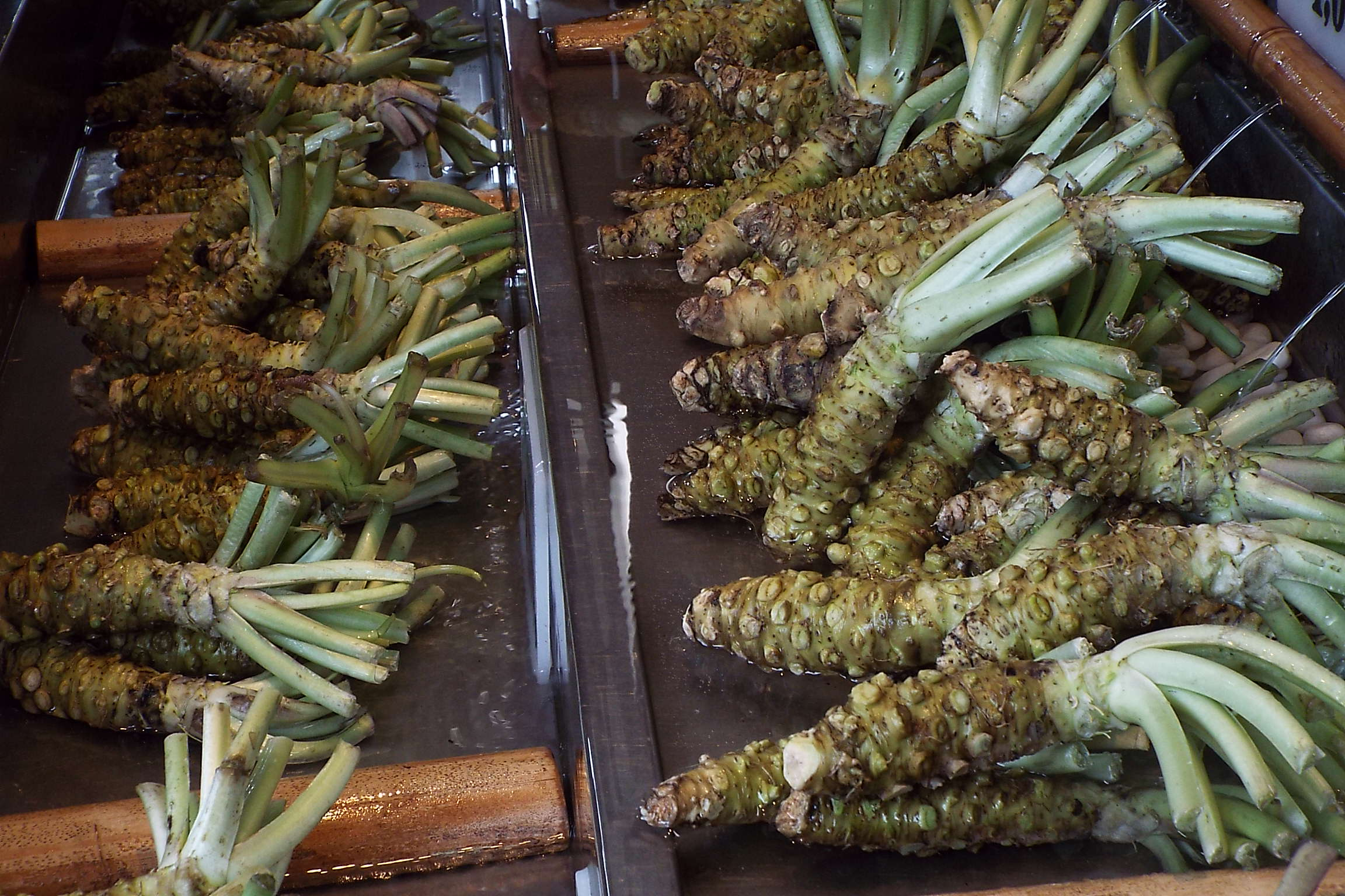 2016-07-03 Daio Wasabi Farm 大王わさび農園